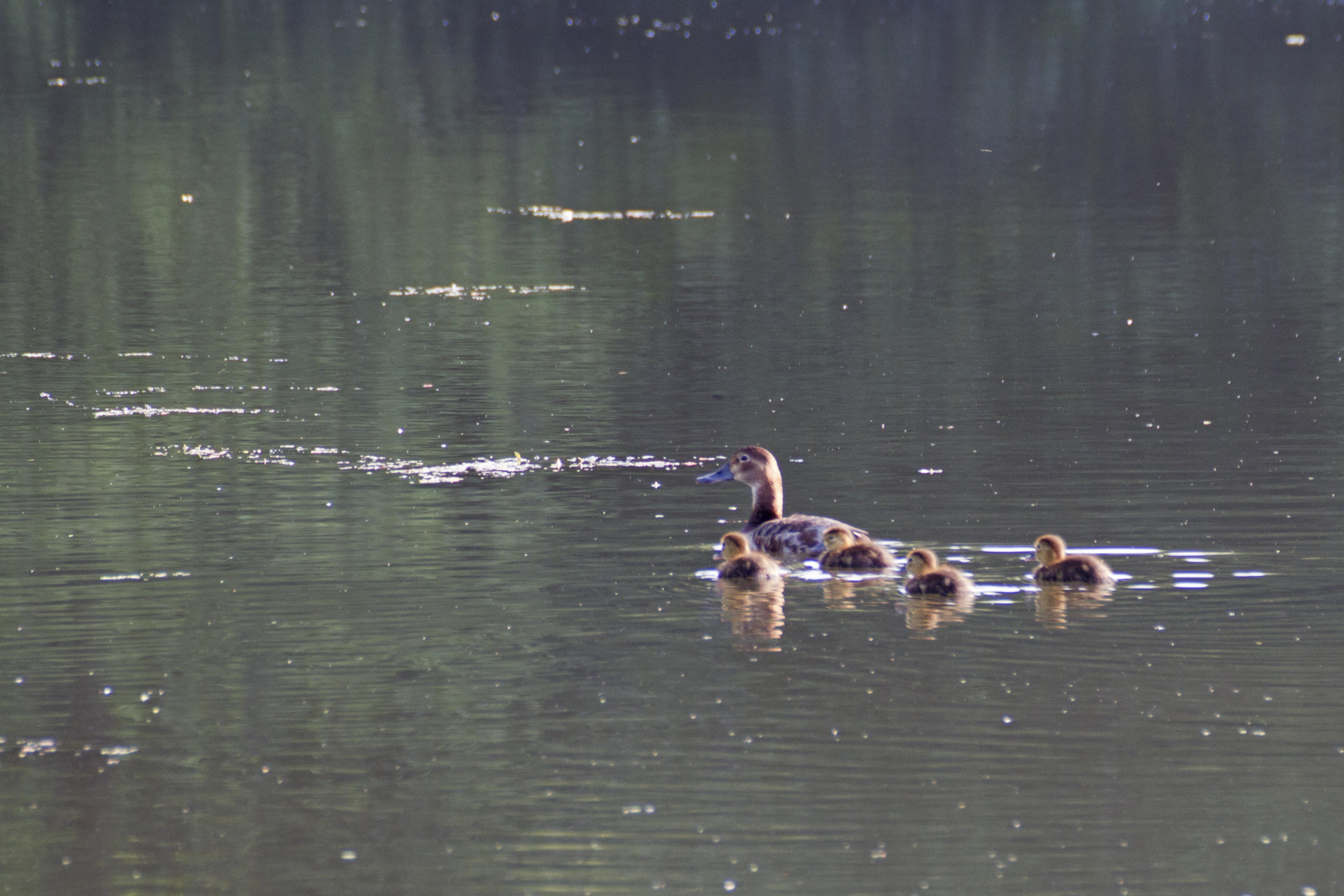 20140609 021 Kessel Weerdbeemden Eend met kuikens